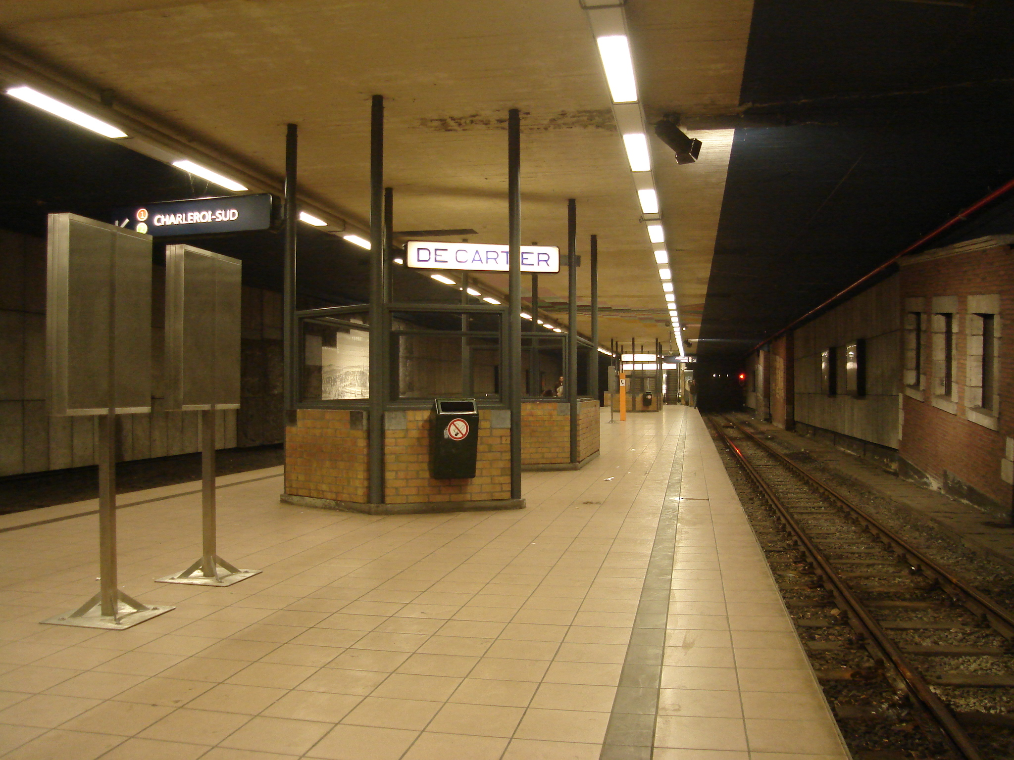 Quai de la station De Cartier.